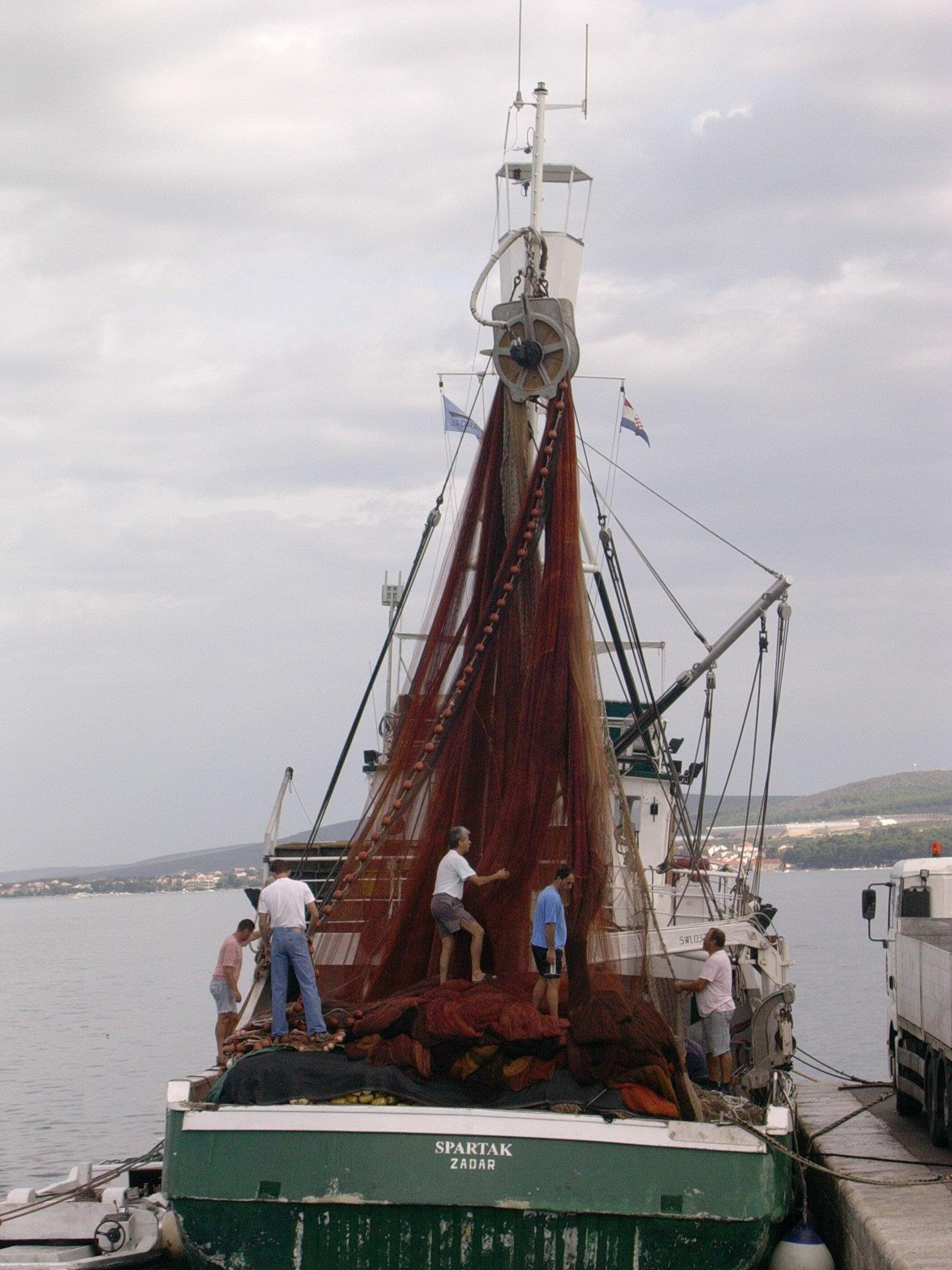 Pêcheurs préparant leur filet, port de Biograd, Croatie, face à l'archipel des Kornati Auteur: Guilhem Dulous